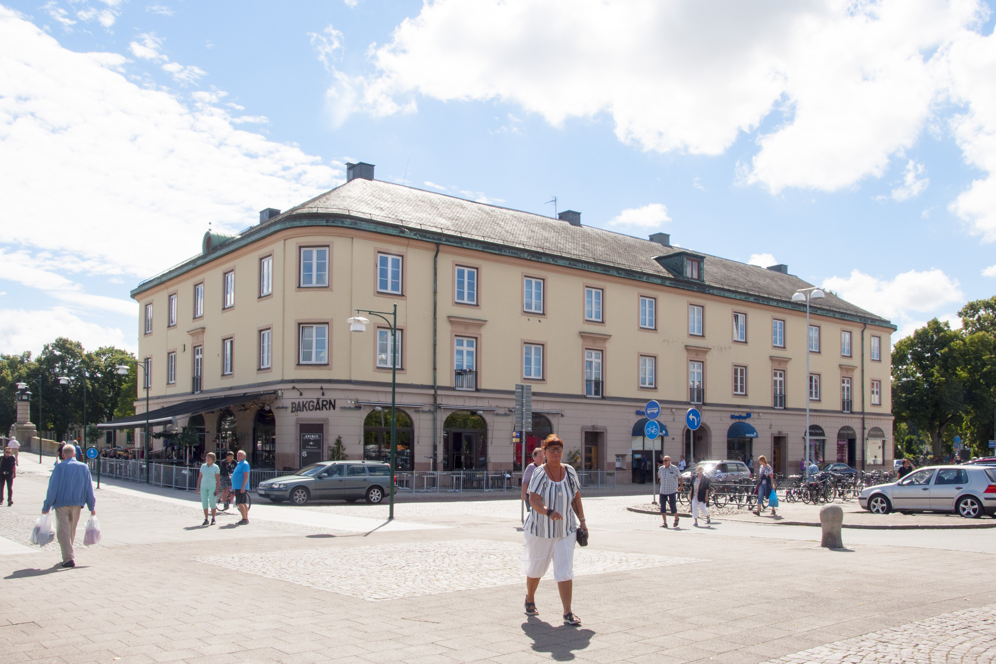 Midgård 4, Lidköping. Ursprungligen Skaraborgsbankens hus. Fick det nuvarande utseendet i en om och tillbyggnad av 1931 enligt arkitekt Axel Emanuel Kumlien